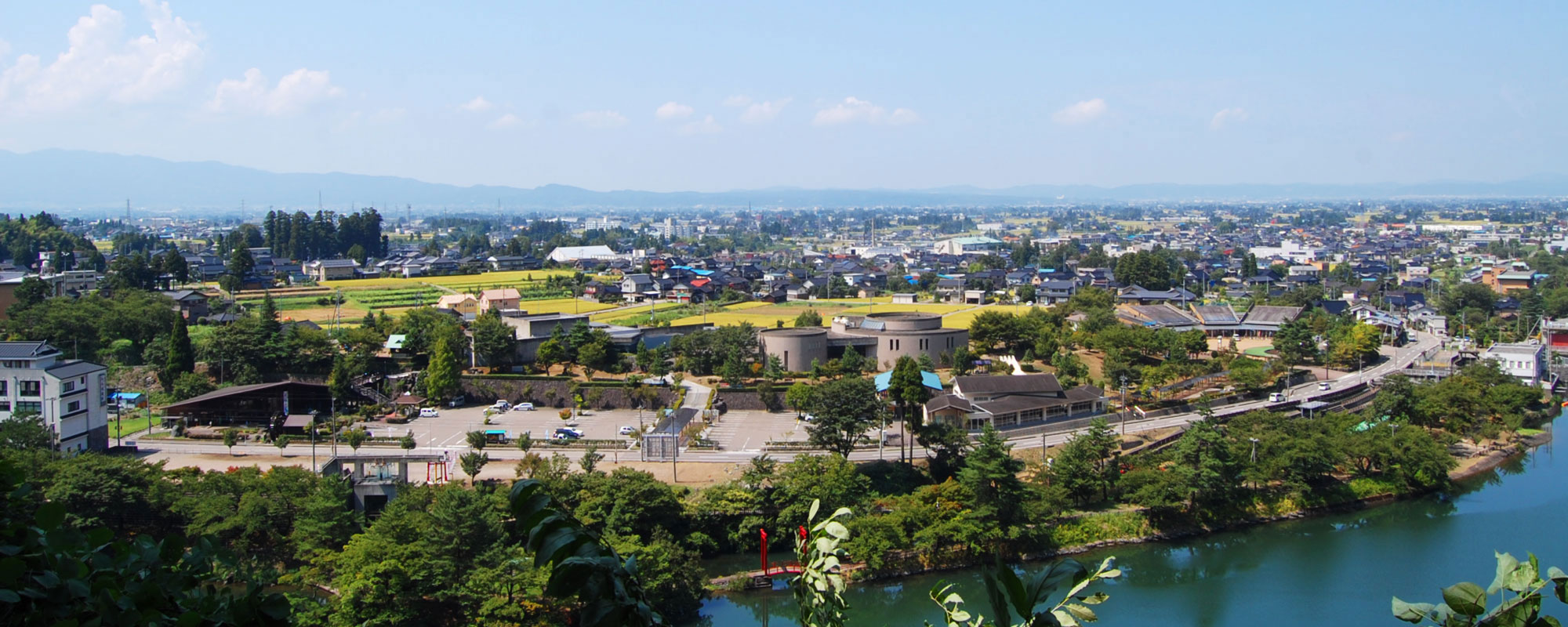 庄川水記念公園（全景）